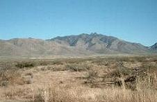 Dos Cabezas Mountains